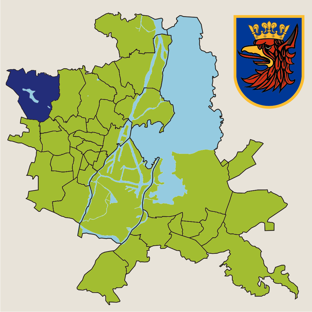 Osiedle "Głębokie-Pilchowo" w Szczecinie – jednostka pomocnicza miasta w 2010